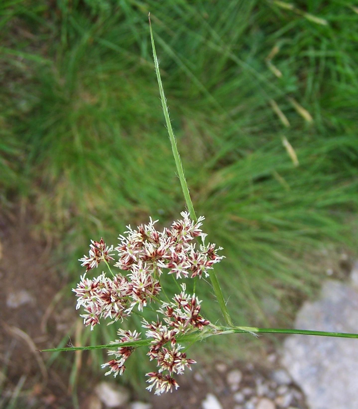 Luzula silvatica (pl. kosmatka olbrzymia), habitat: Tatra Mountains, Królowa Rówień